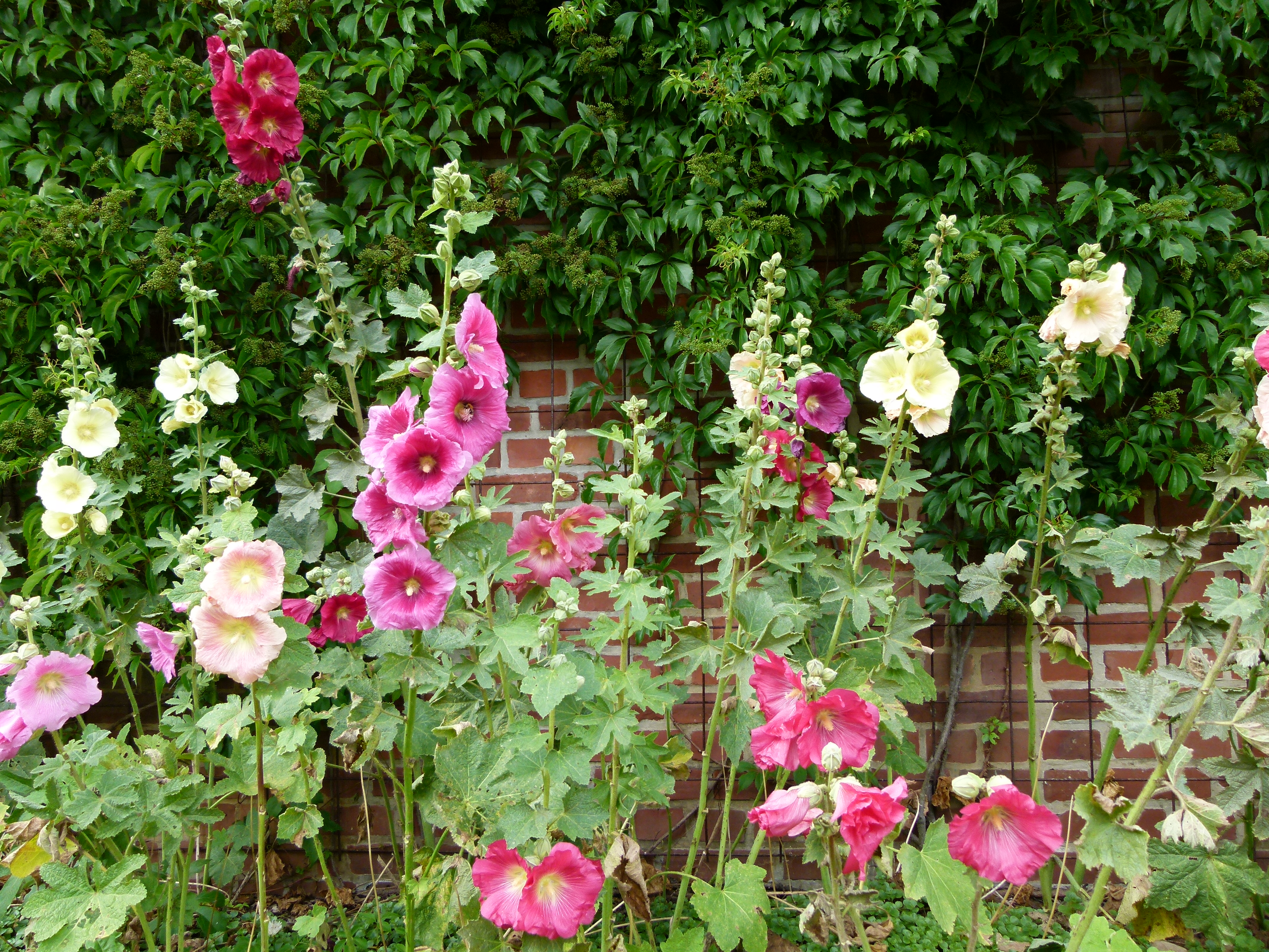 Roses trémières.